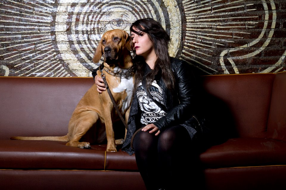 Elis Paprika con su Dakota, durante la promocion de Animal.